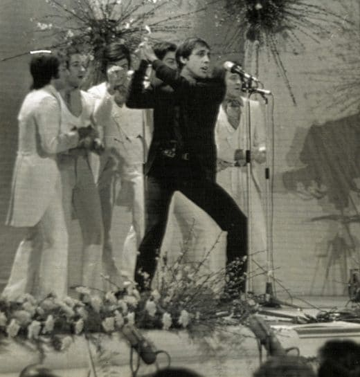 Adriano Celentano al Festival di Sanremo 1970